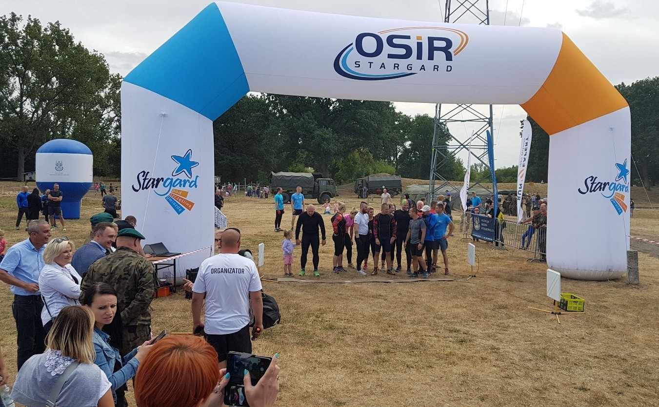 Święto 14BUJ